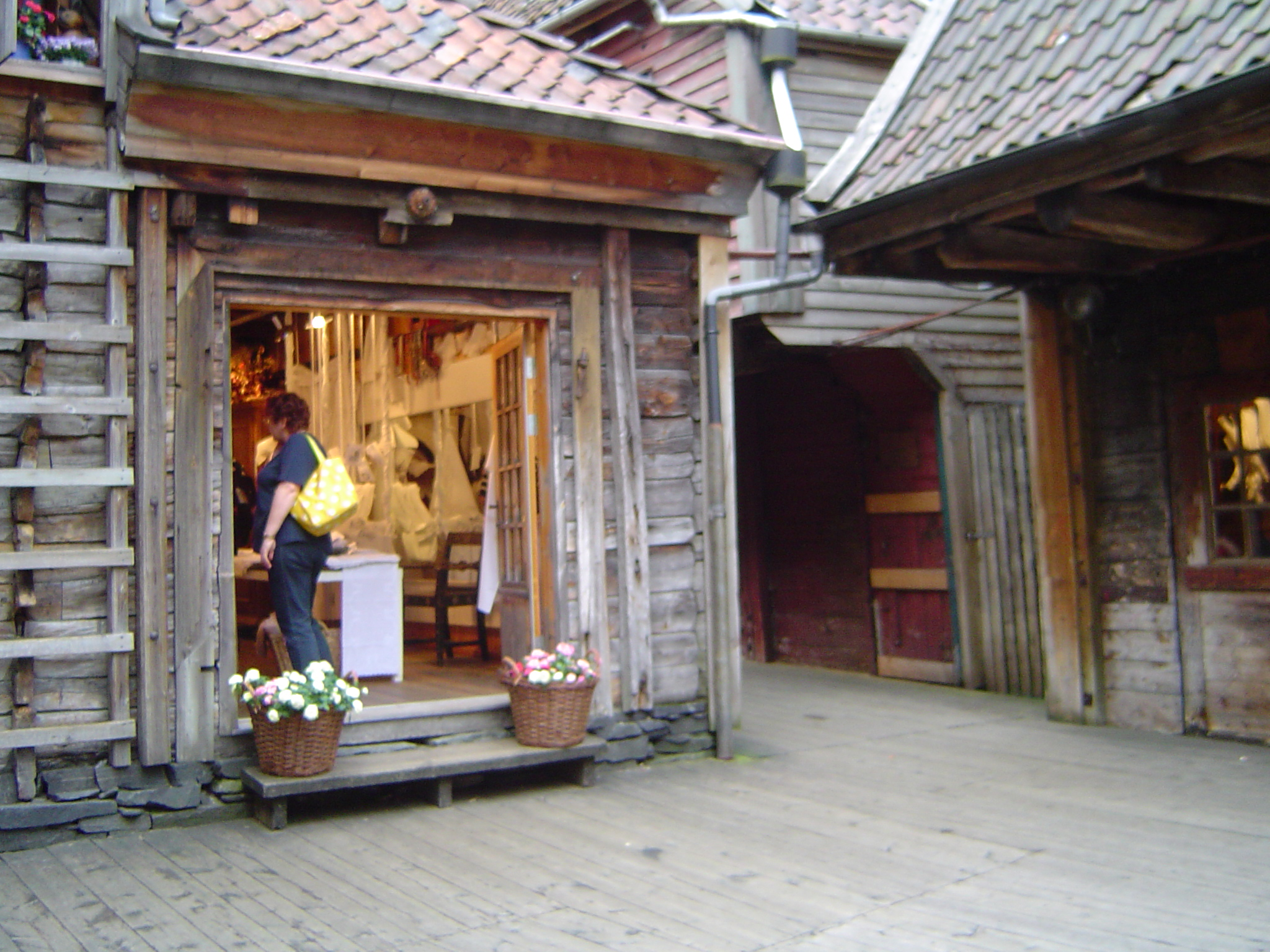 Hansevéierel zu Bergen.